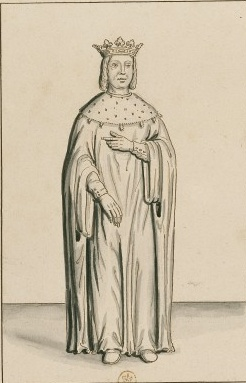 Ludvík Orleánský